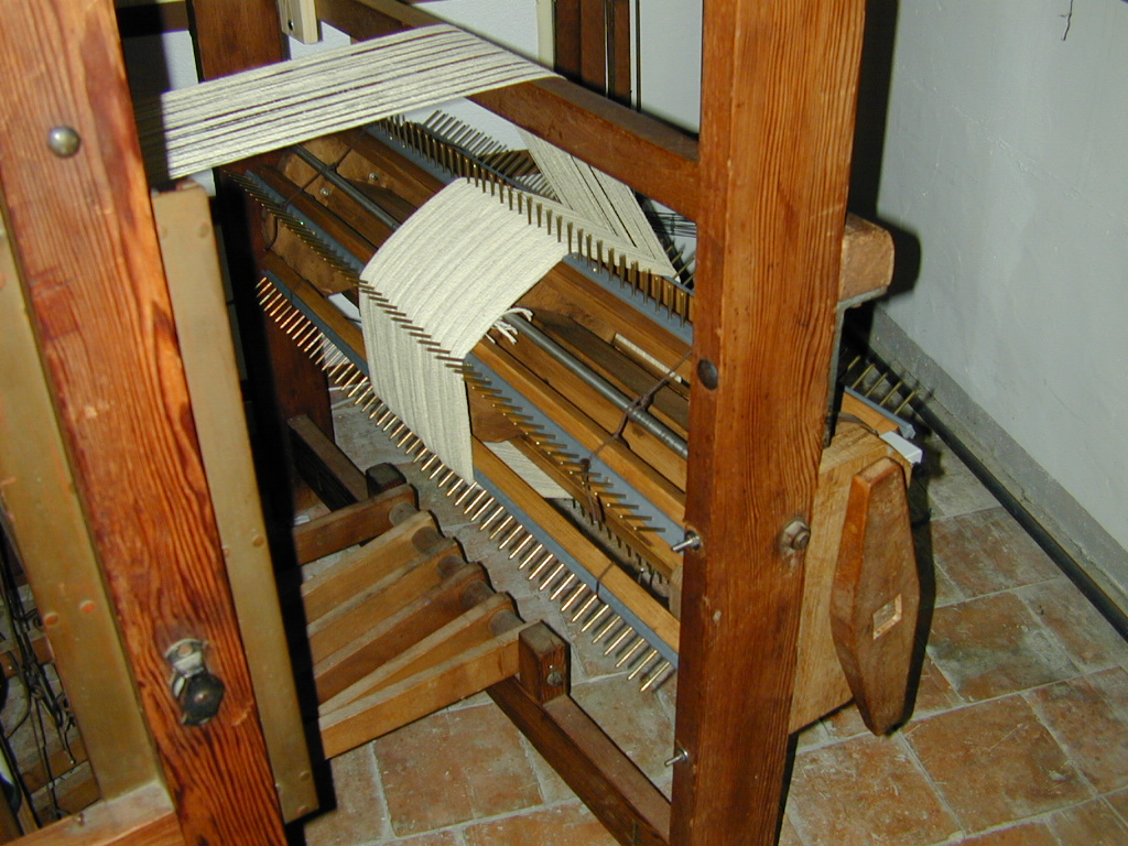 Foto mia personale, subbio posteriore di telaio a settori Licensing Categoria:Immagini sulla tessitura